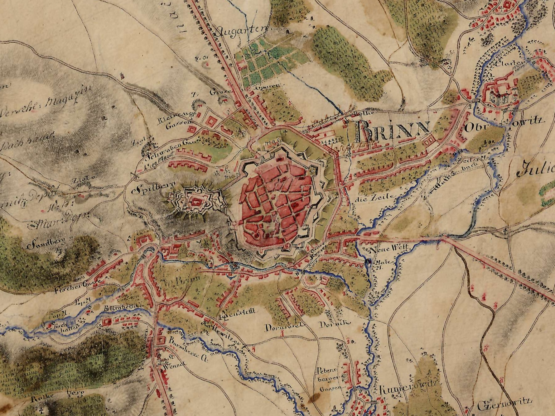 Mapa Brna z prvního vojenského mapování. (1763-1787)